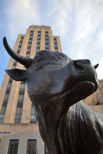 bull statue